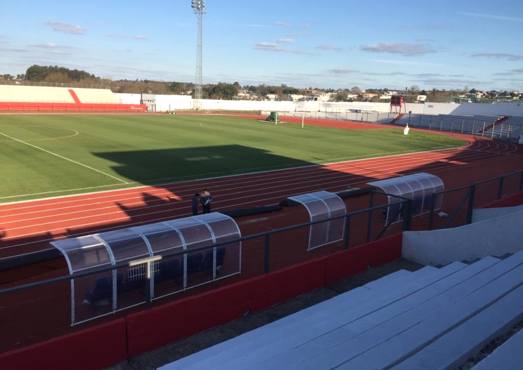 Reformas del Estadio Silvestre Octavio Landoni de Durazno.